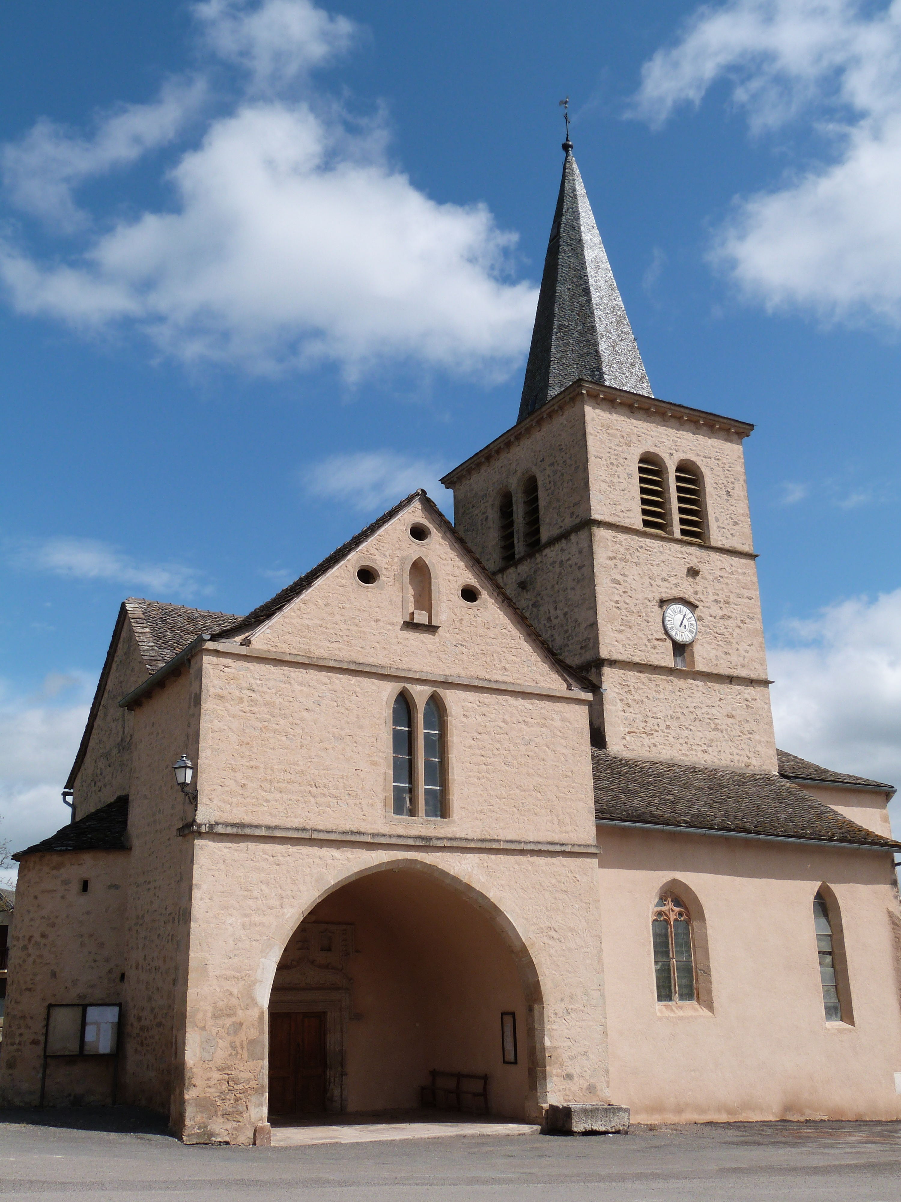 Façade sud de l'église de Balsac